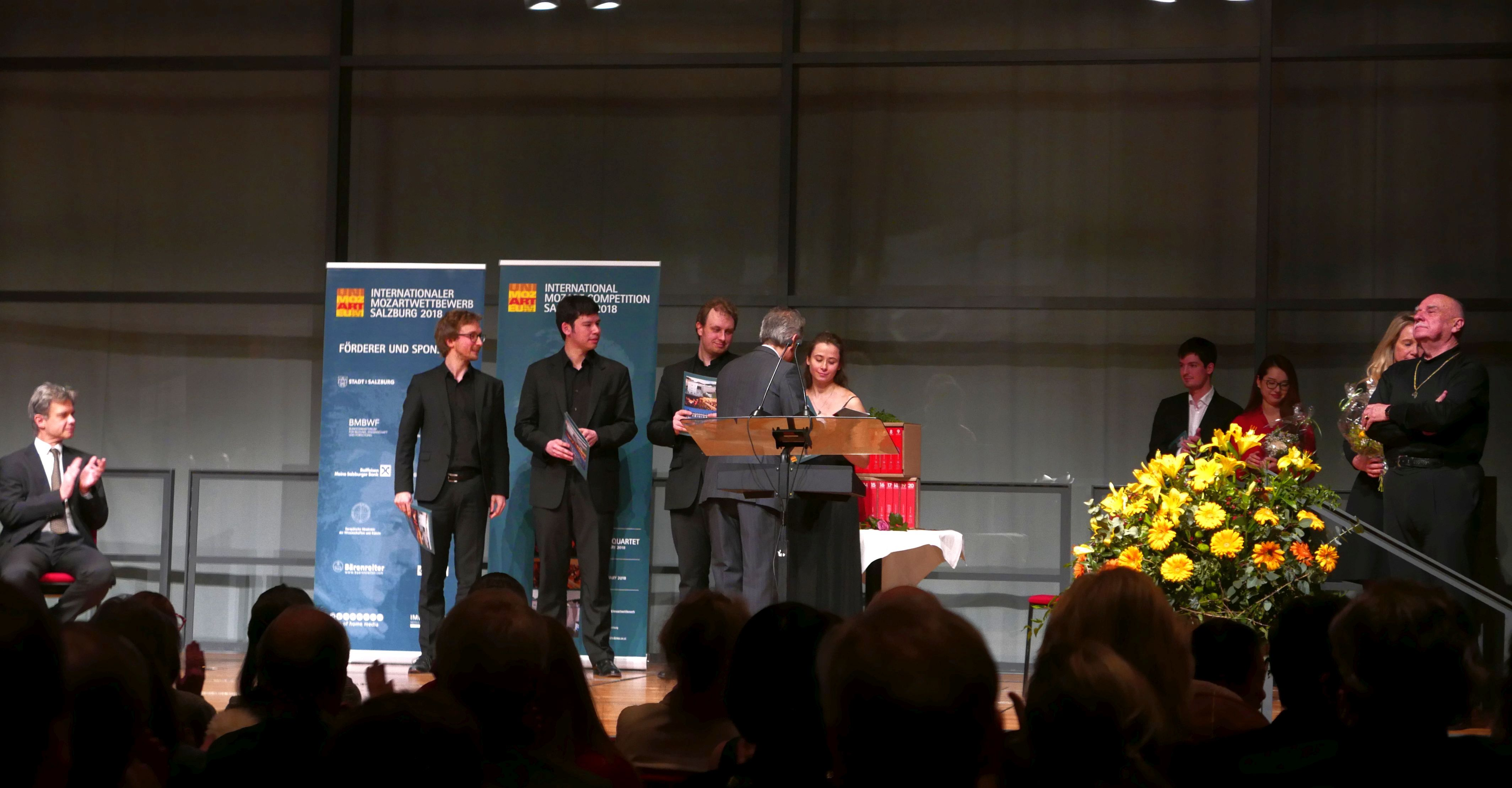 Internationaler Mozartwettbewerb 2018 Streichquartett Preisverleihung: Eliot Quartett (2. Preis); Graziano Mandozzi (rechts)